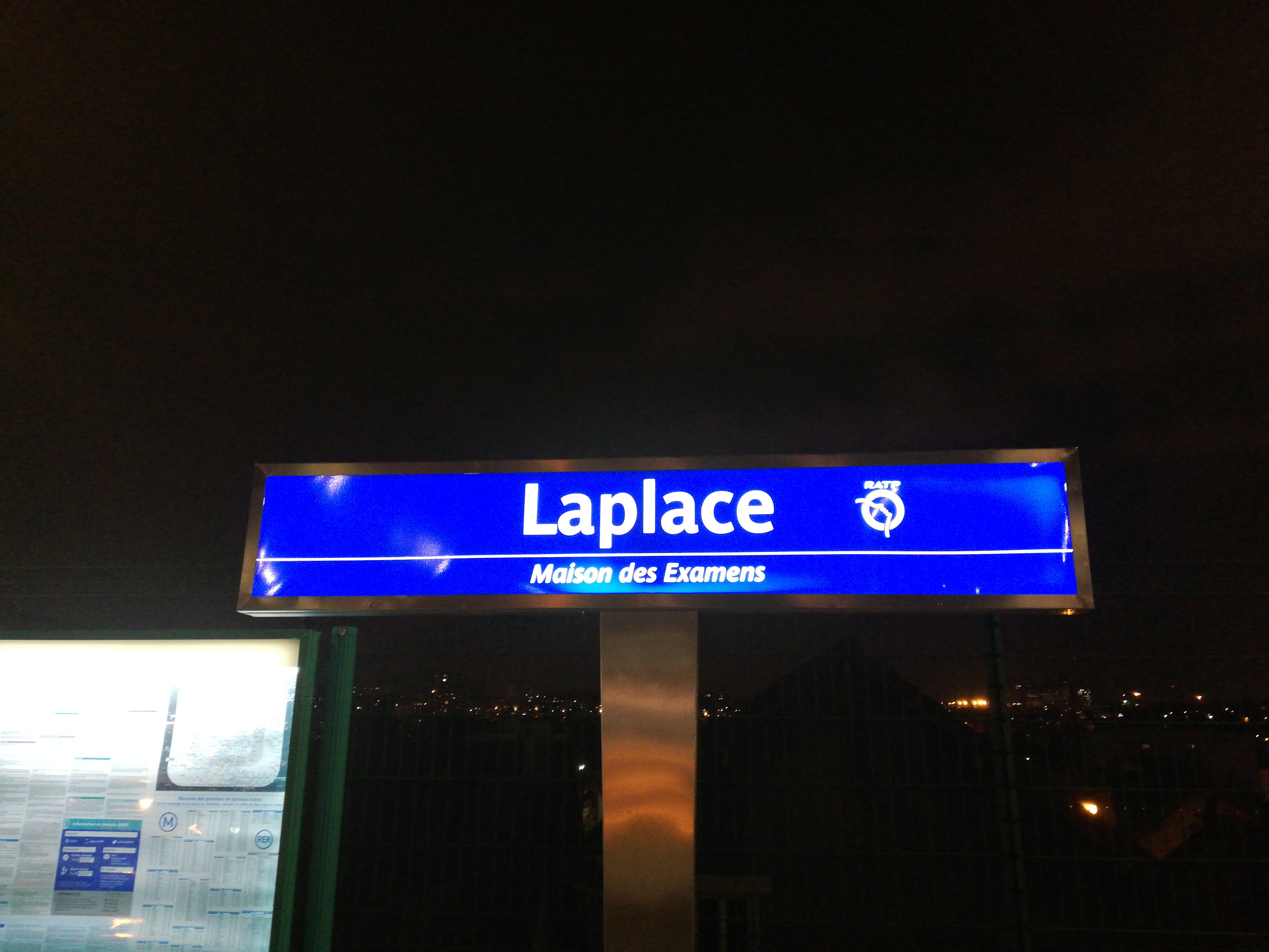 Plaque signalétique de la gare de Laplace - Maison des Examens, en 2019. On peut noter la présence du sous-titre "Maison des Examens".